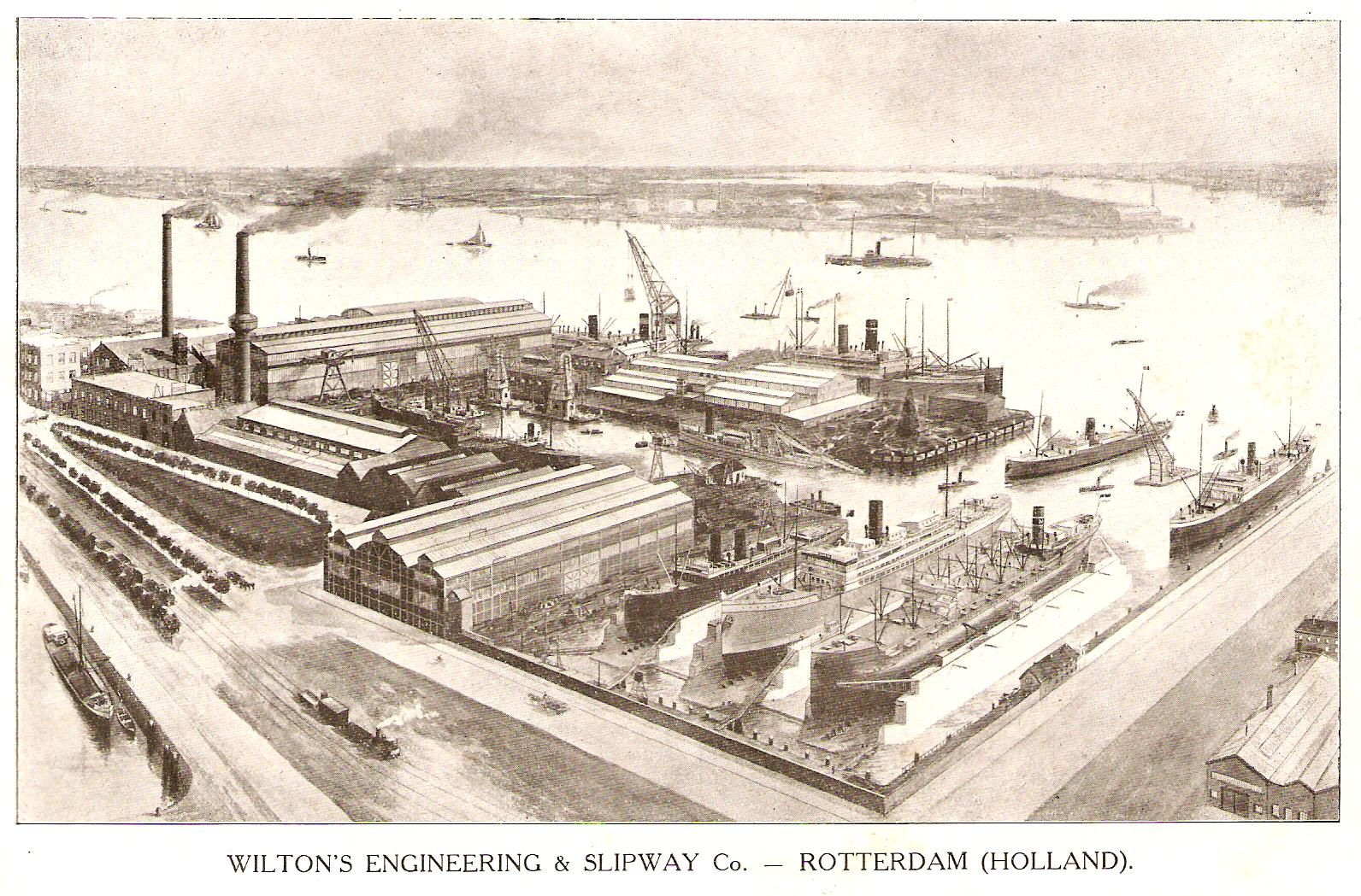 Wilton engineering and slipway Co, Rotterdam 1918 from Dirkzwager Guide Waterweg, Netherlands, 1918